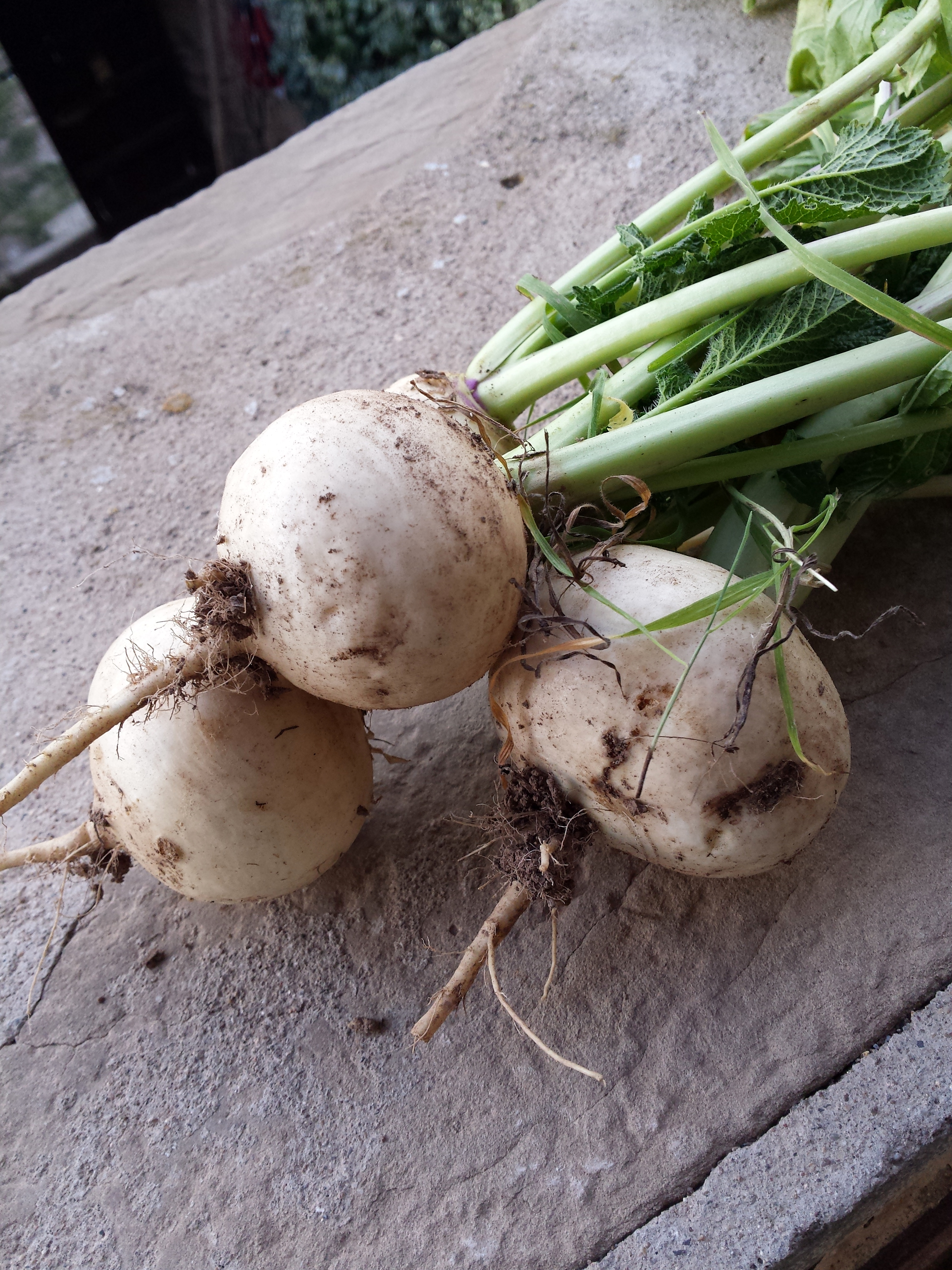 Naps de la varietat de bola, Castelltallat, Bages